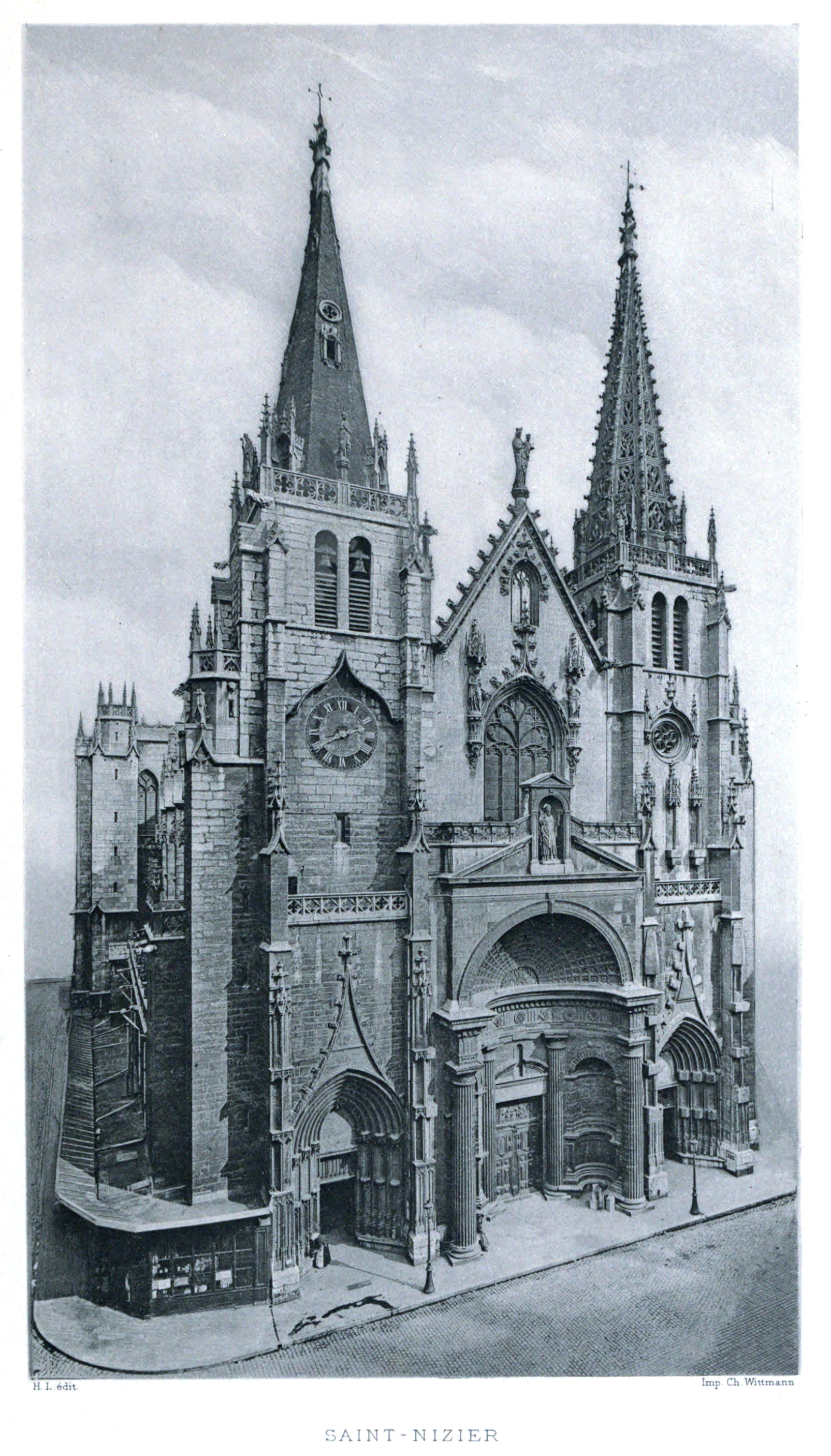 Illustration pour l'Histoire des églises et chapelles de Lyon